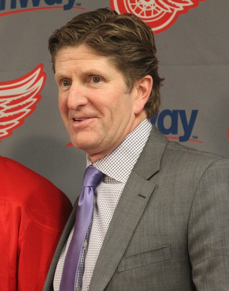 Ken Holland, Henrik Zetterberg and coach Mike Babcock.